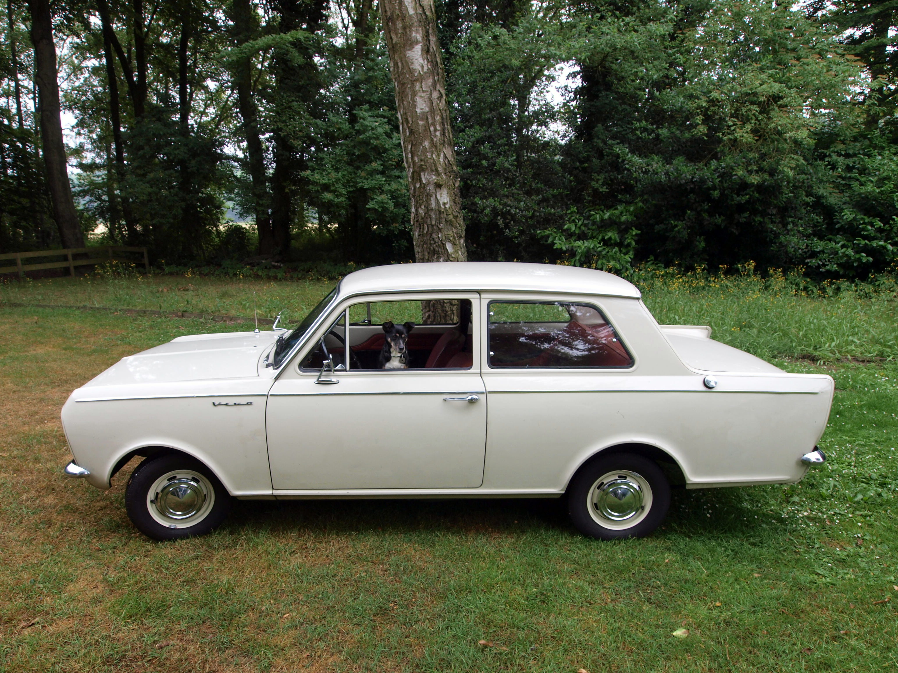 1966 Vauxhall HAD